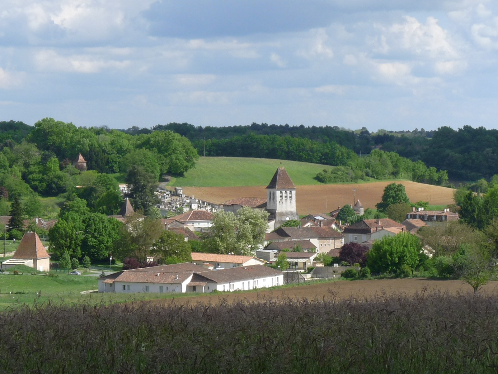 Vanxains vue de l'ouest, Dordogne, France